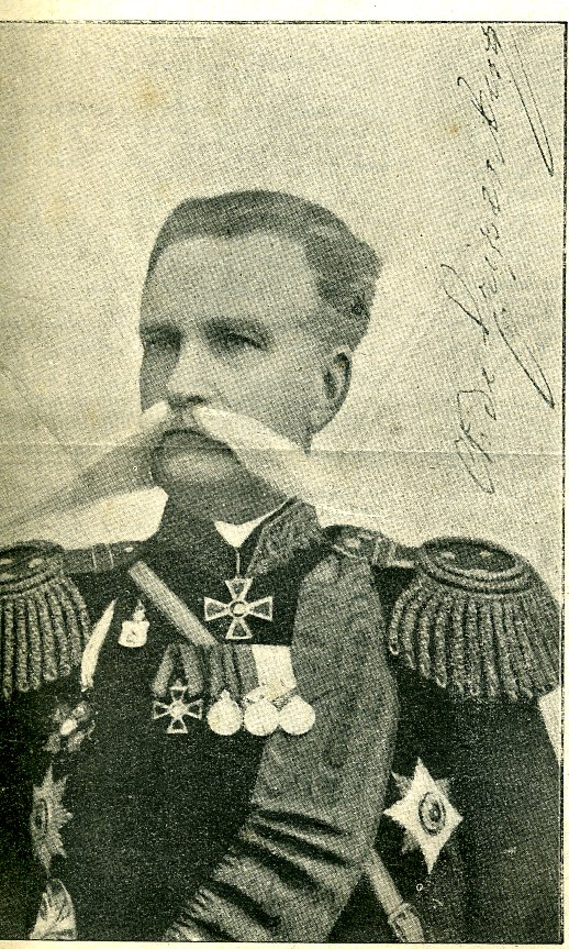 Le général Gripenberg chargé du commandement de la seconds armée mandchourienne